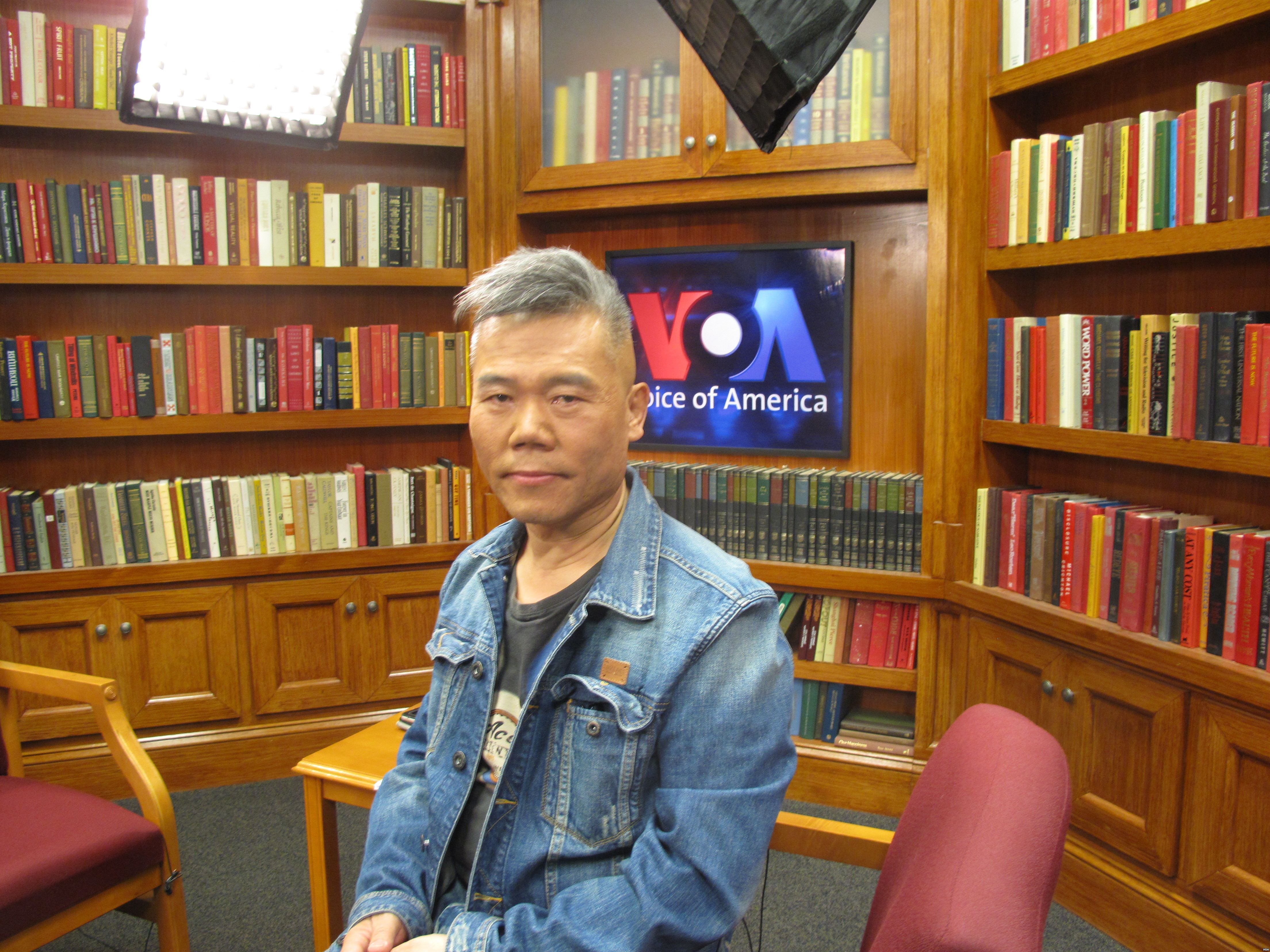 中国著名左派学者司马南在美国之音接受采访(美国之音王南拍摄)